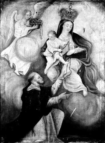 Уручэнне ружанца святому Дамініку. XVIII ст., в. Гярвяты, Астравецкі р-н